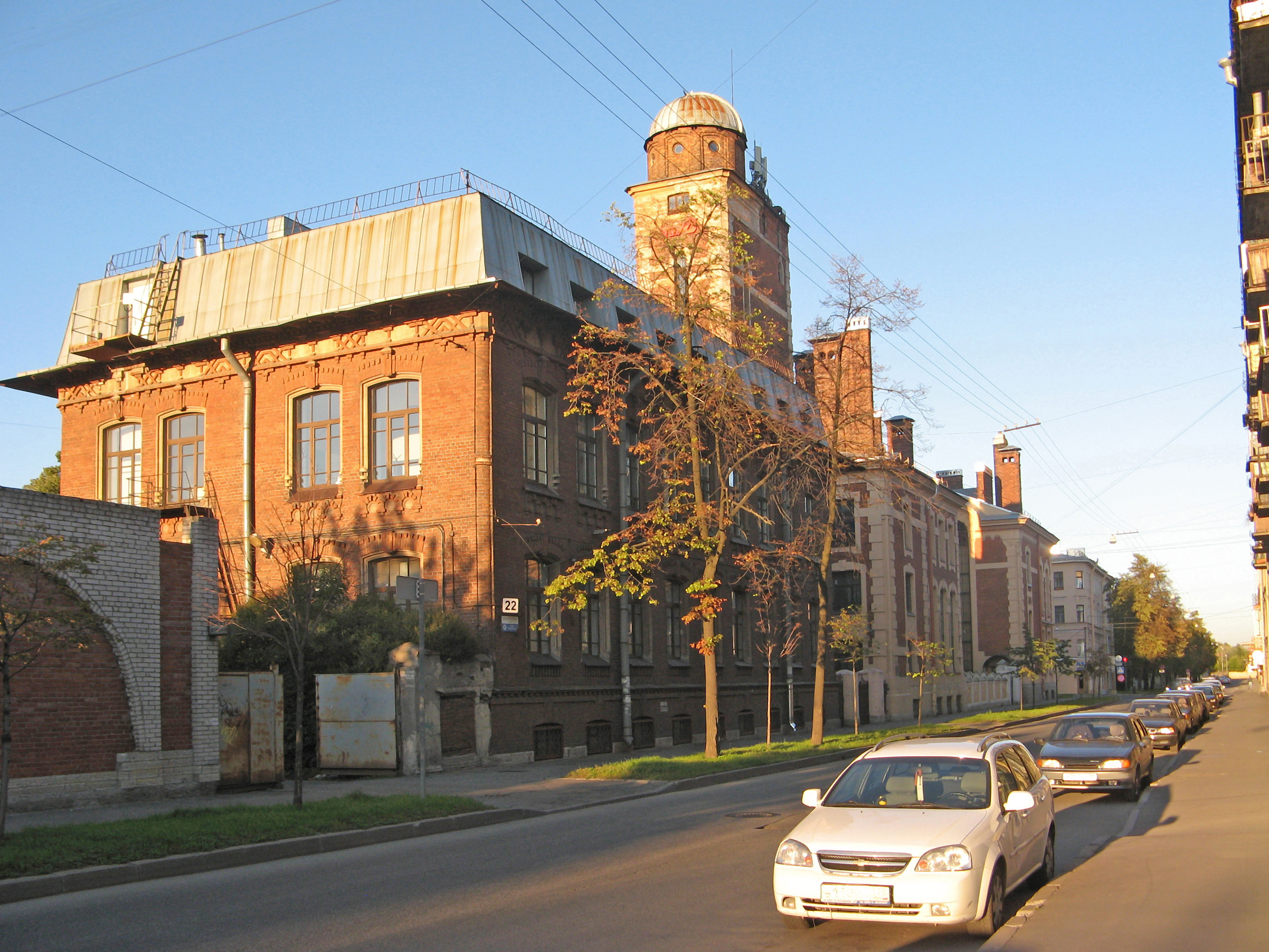 Здание музея учебных пособий народного дома графини Паниной: улица Прилукская, 22, Фрунзенский район, Санкт-Петербург